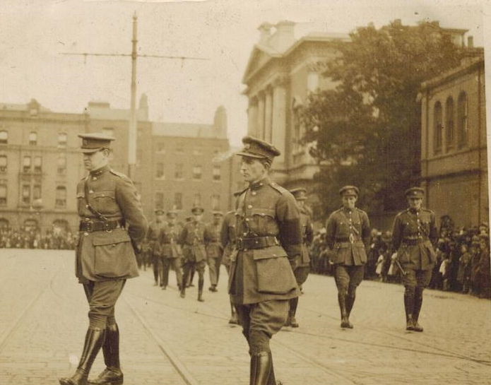 Fotoj de Mícheál Ó Coileáin kaj Risteard Ó Maolchatha ĉe la ŝtata funebraĵo d' Art Ó Gríofa, Áth Cliath, 16 Lúnasa 1922.